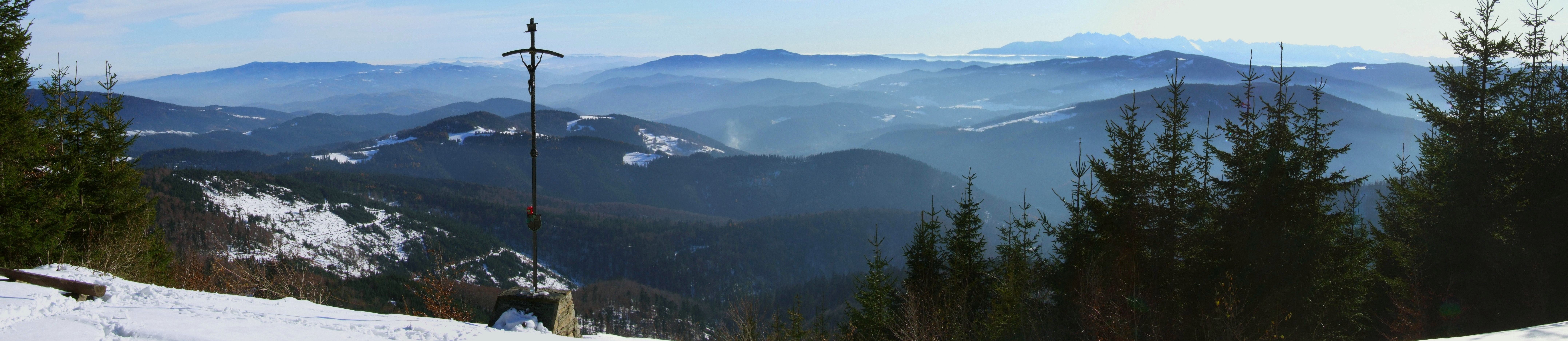 Panorama spod krzyża na Mogielicy